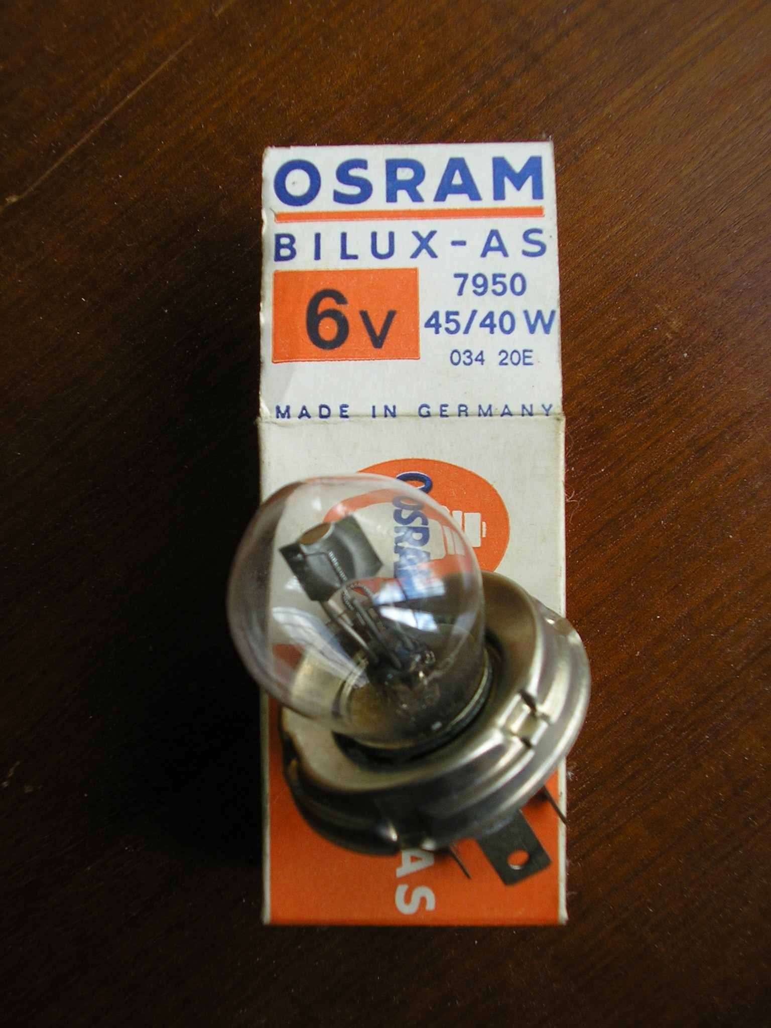 H2-Halogenlampe